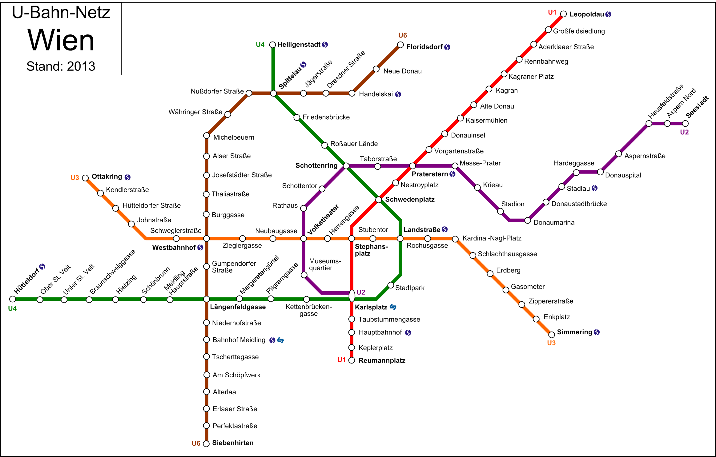 U-Bahn-Netz Wien